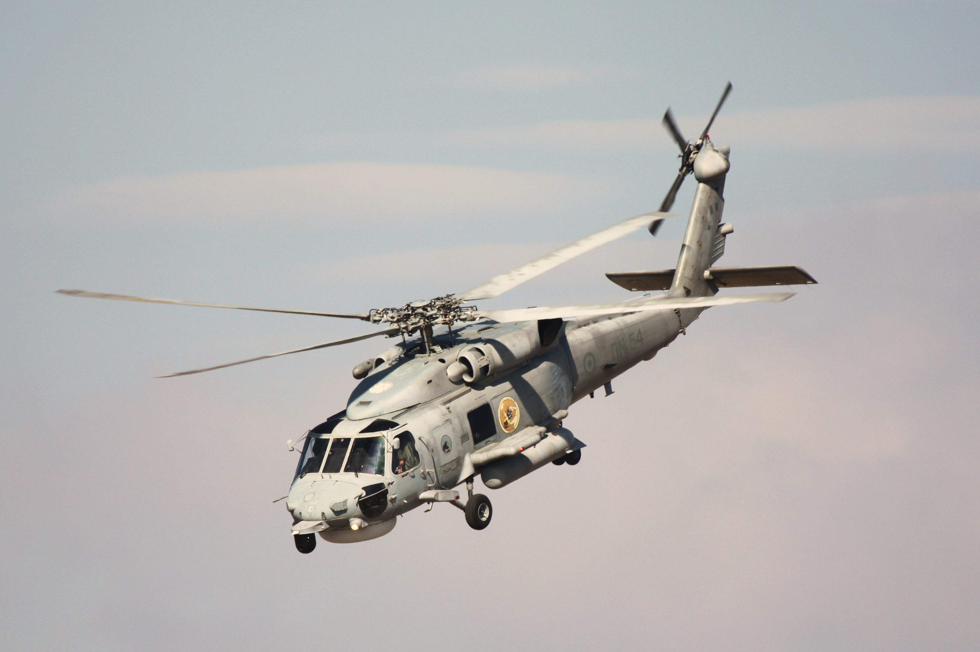 Sikorsky S.70B-6 Aegean Hawk